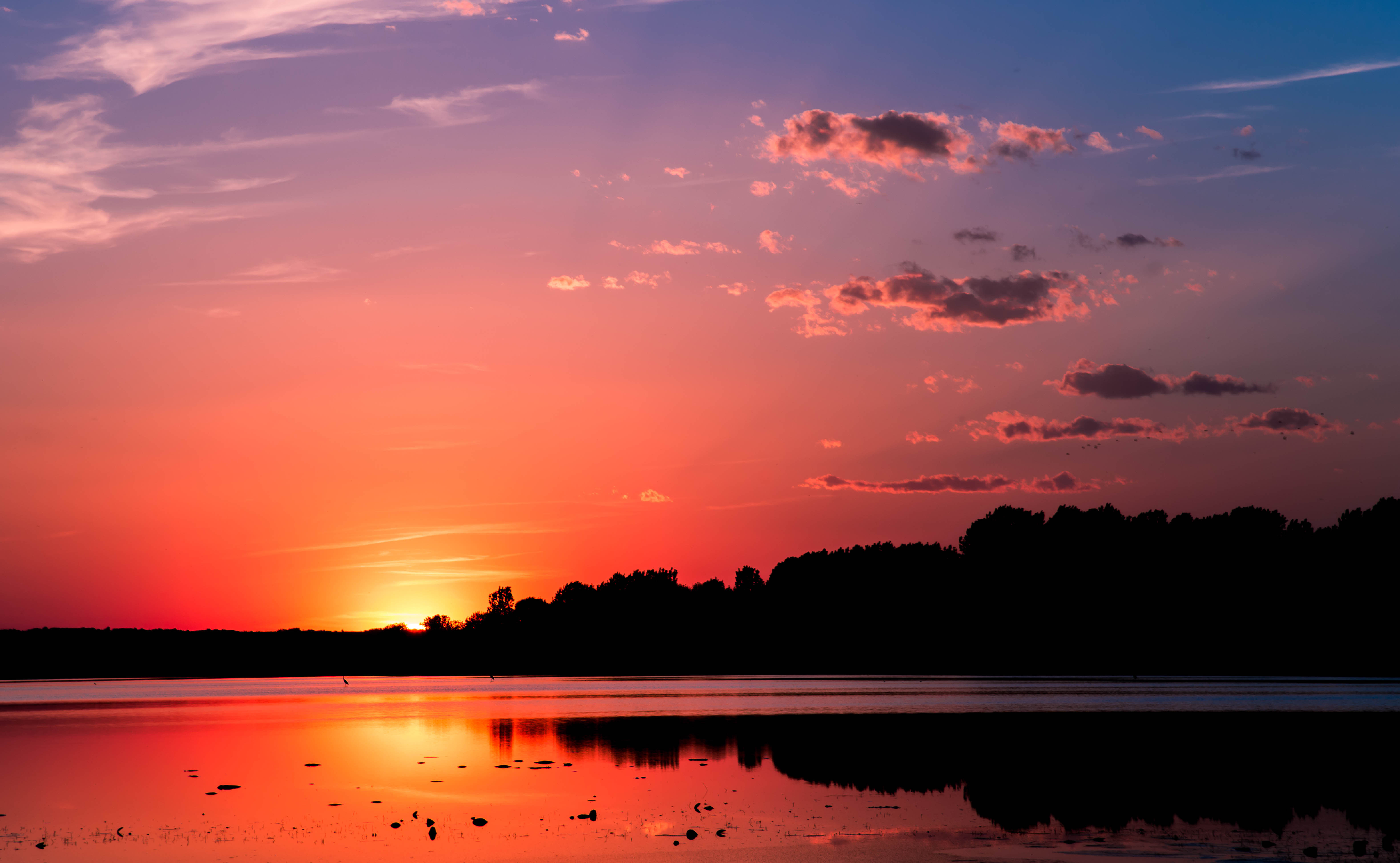 Ово је фотографија заштићеног природног добра у Србији под шифром: РП09This is a a photo of a natural area in Serbia with ID: РП09 Carska bara